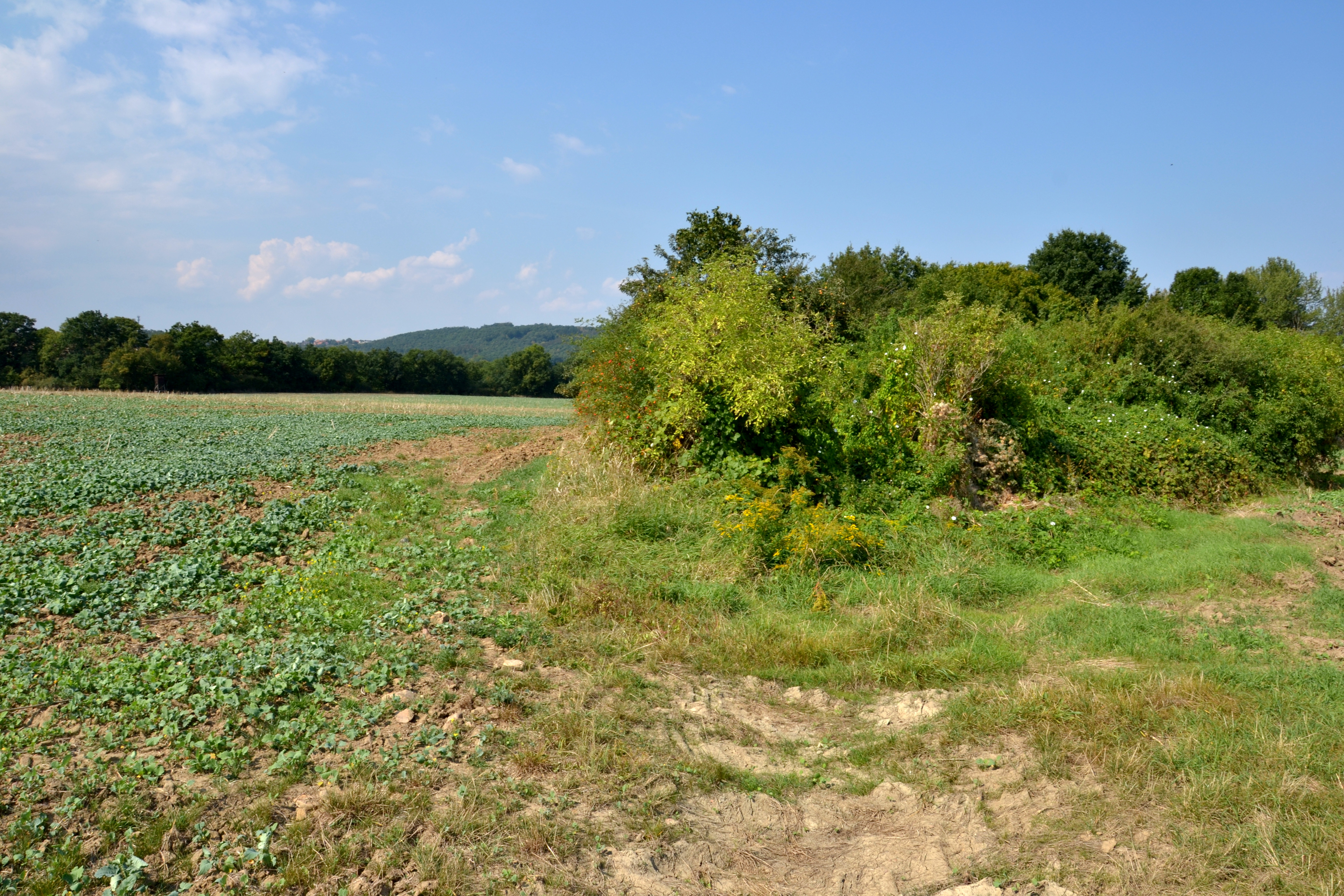 Vyústění rokle, která vymezuje východní okraj hradiště